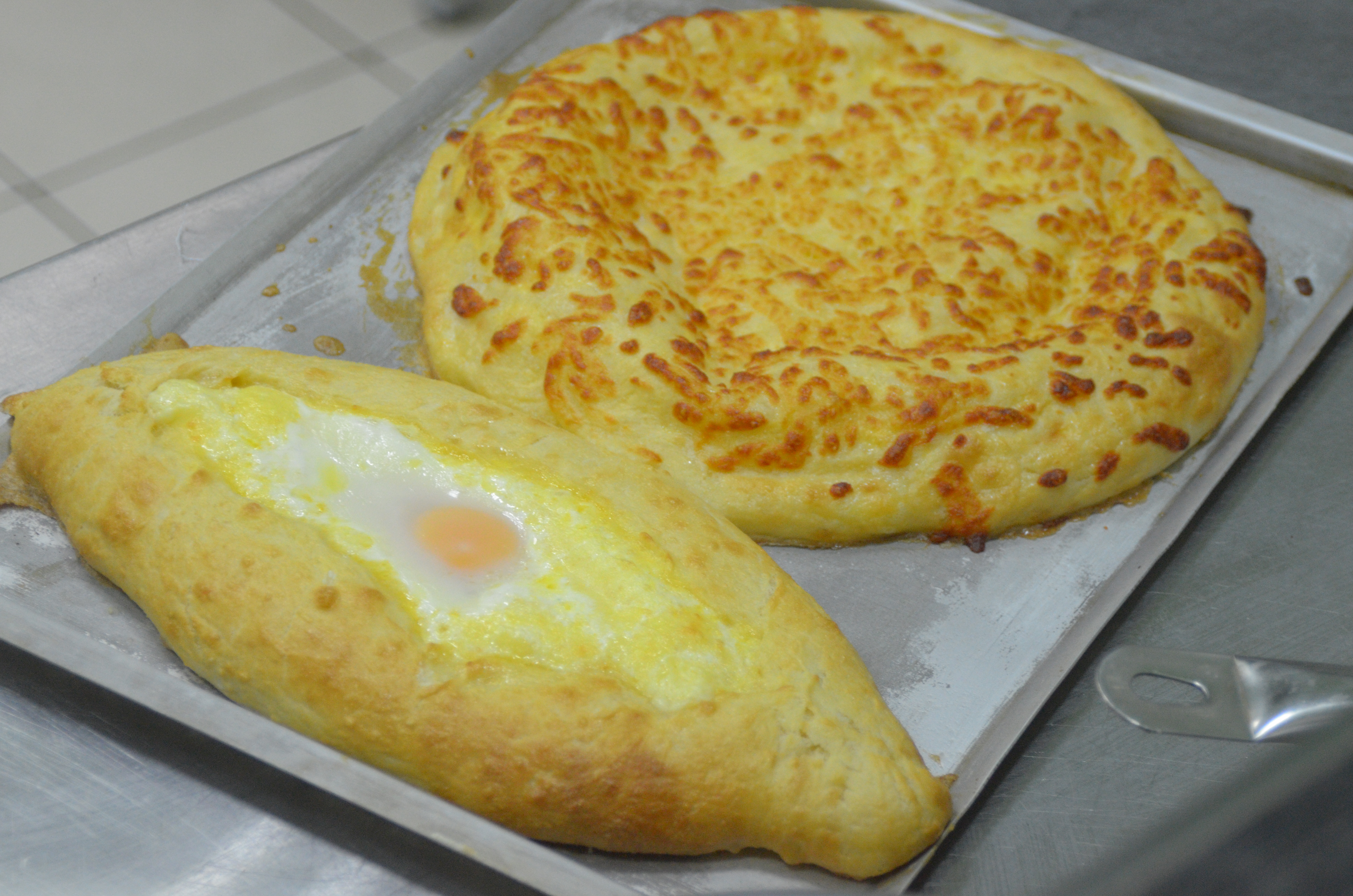 Ресторан «Ньютон» в Донецке.